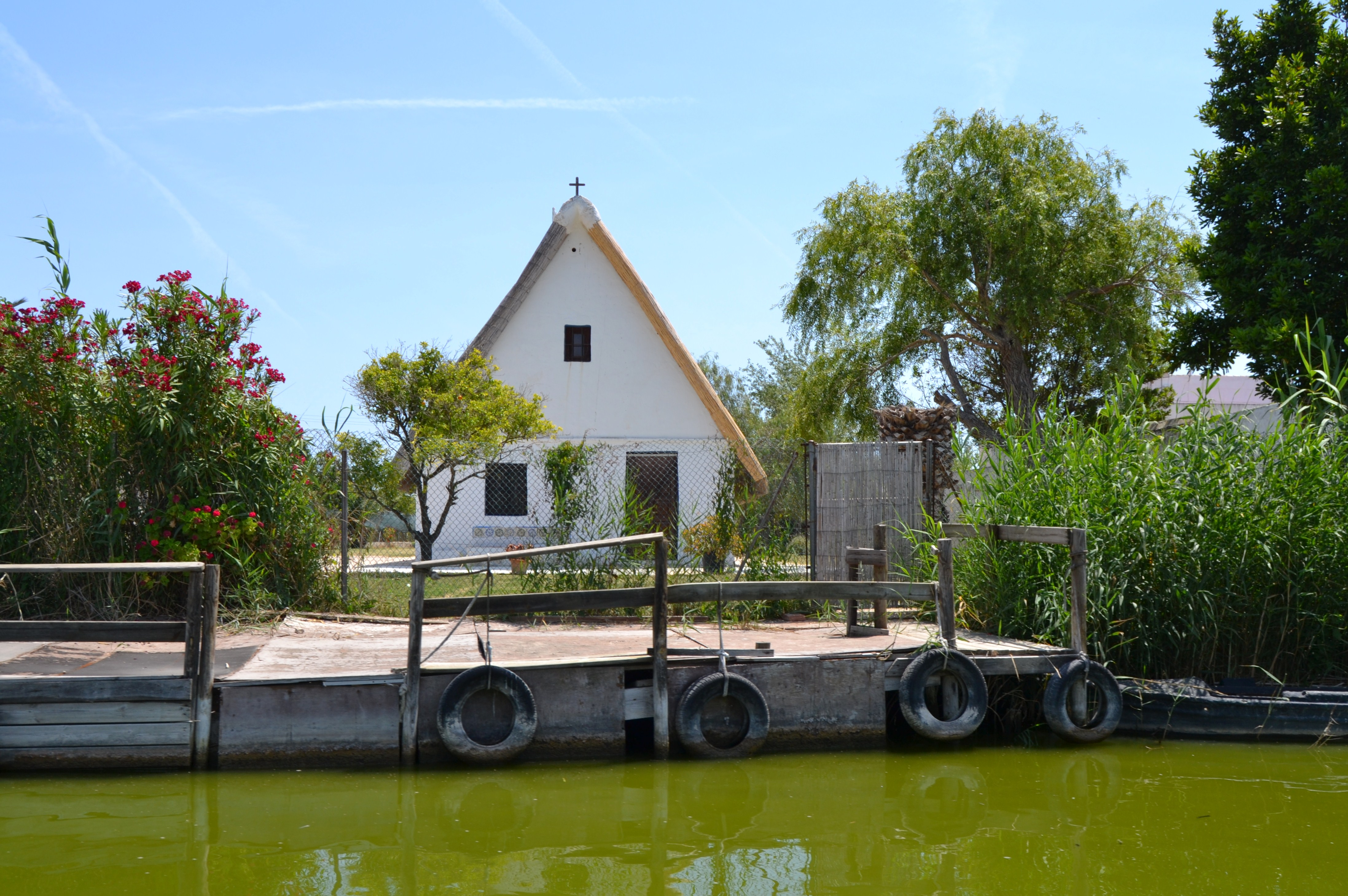 Albufera de València, barraca.